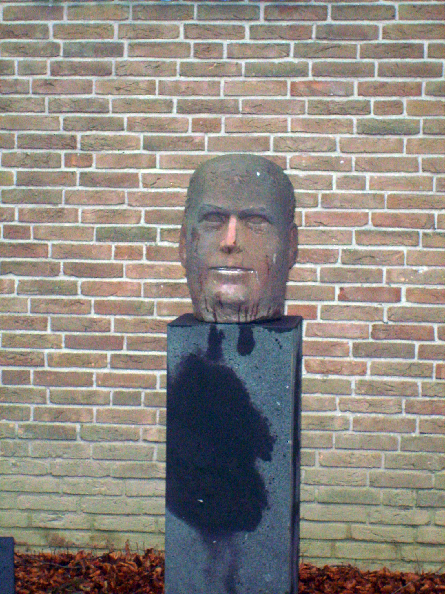 Eine Büste von Erich Klausener